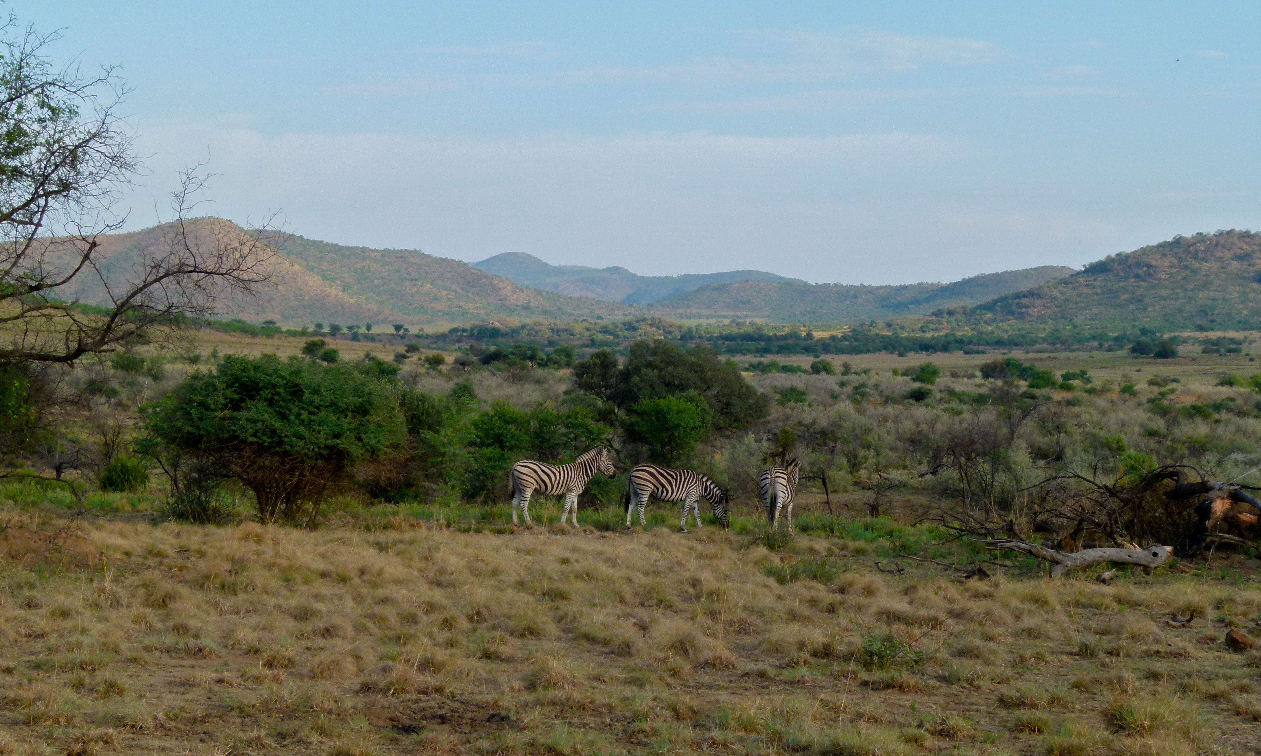 Pilanesberg NP, SOUTH AFRICA